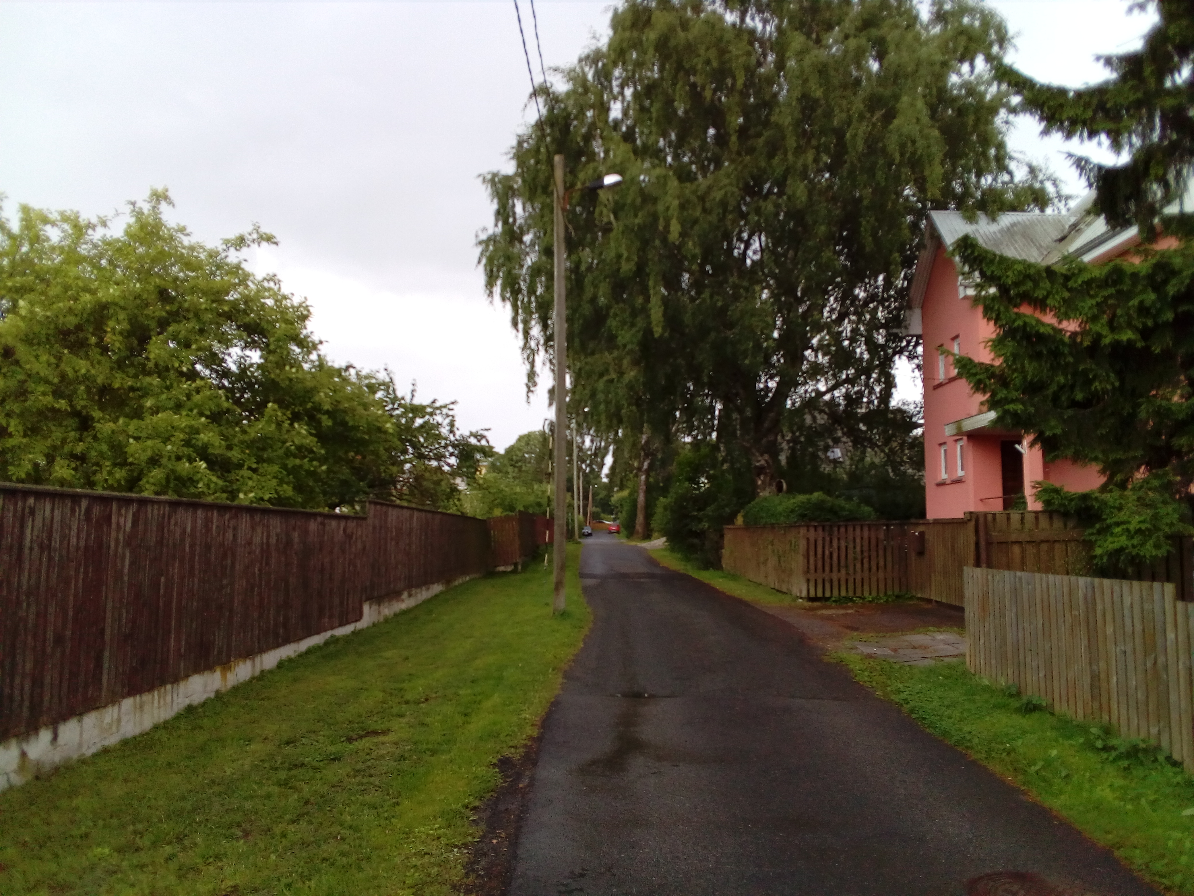 Pardi tänav